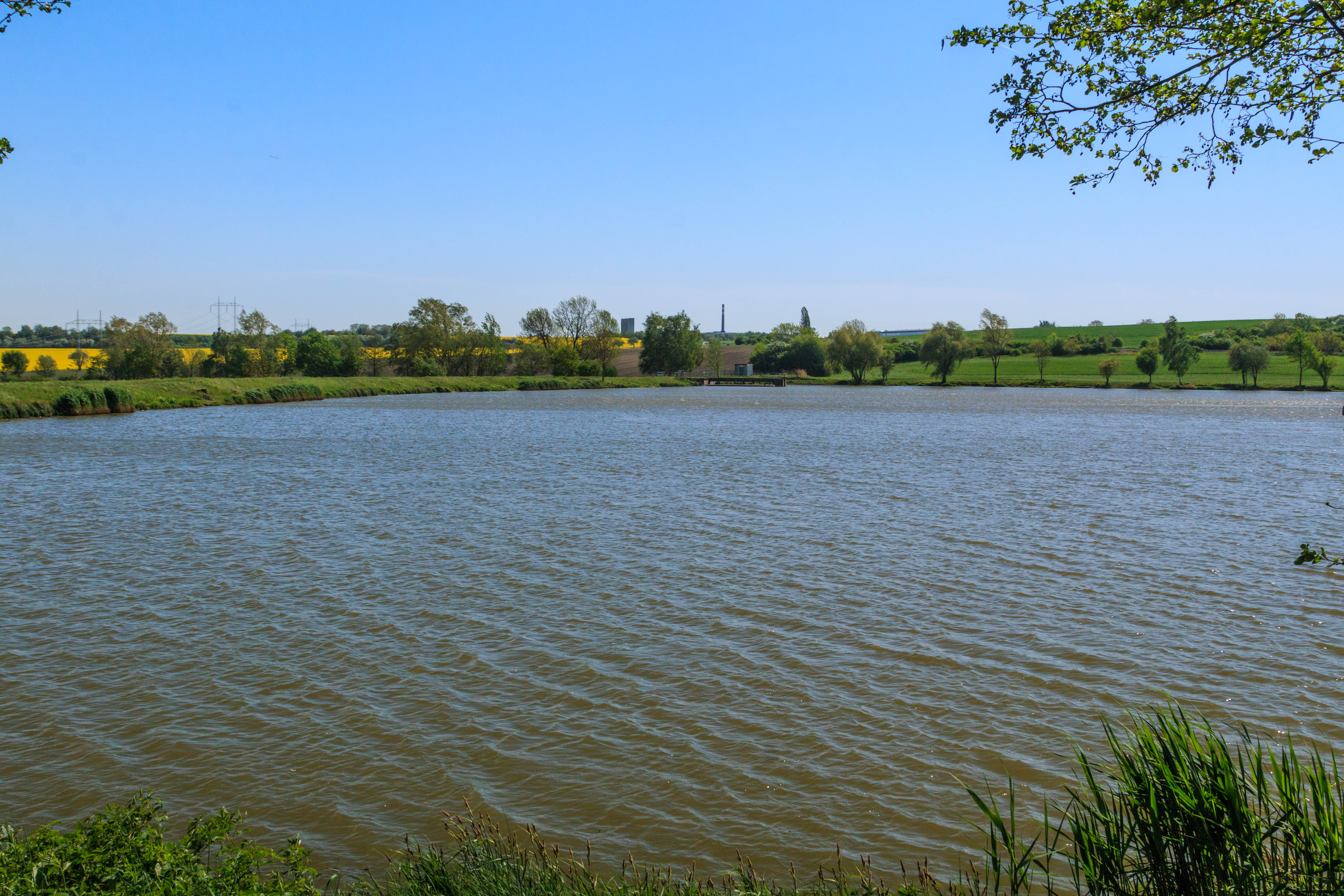 Markovický rybník u Chrudimi Project: Vodstvo.